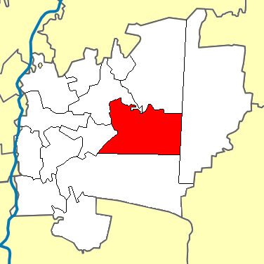 Кузяновська сільська рада